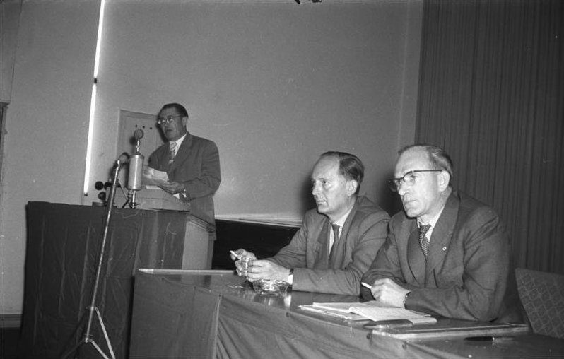 Zentralbild, 10.5.1957 Wissenschaftler protestieren gegen Anwendung von Atomwaffen Ein öffentliches Forum, auf dem Vertreter der Wissenschaft gegen den Missbrauch ihrer Forschungsergebnisse auf dem Gebiet der Atomenergie protestierten, veranstalteten der Ausschuss der Nationalen Front Berlin und die Gesellschaft zur Verbreitung wissenschaftlicher Kenntnisse, Bezirksvorstand Berlin, am 10.5.1957 im Auditorium maximum der Berliner Humboldt-Universität. UBz: Der Stellvertreter des Vorsitzenden des Ministerrats Fritz Selbmann spricht über die Atomaufrüstung in Westdeutschland. Rechts der Sekretär des ZK der SED Gerhart Ziller links daneben, der Vorsitzende des Berliner Friedenrates, Prof. Dr. Havemann.